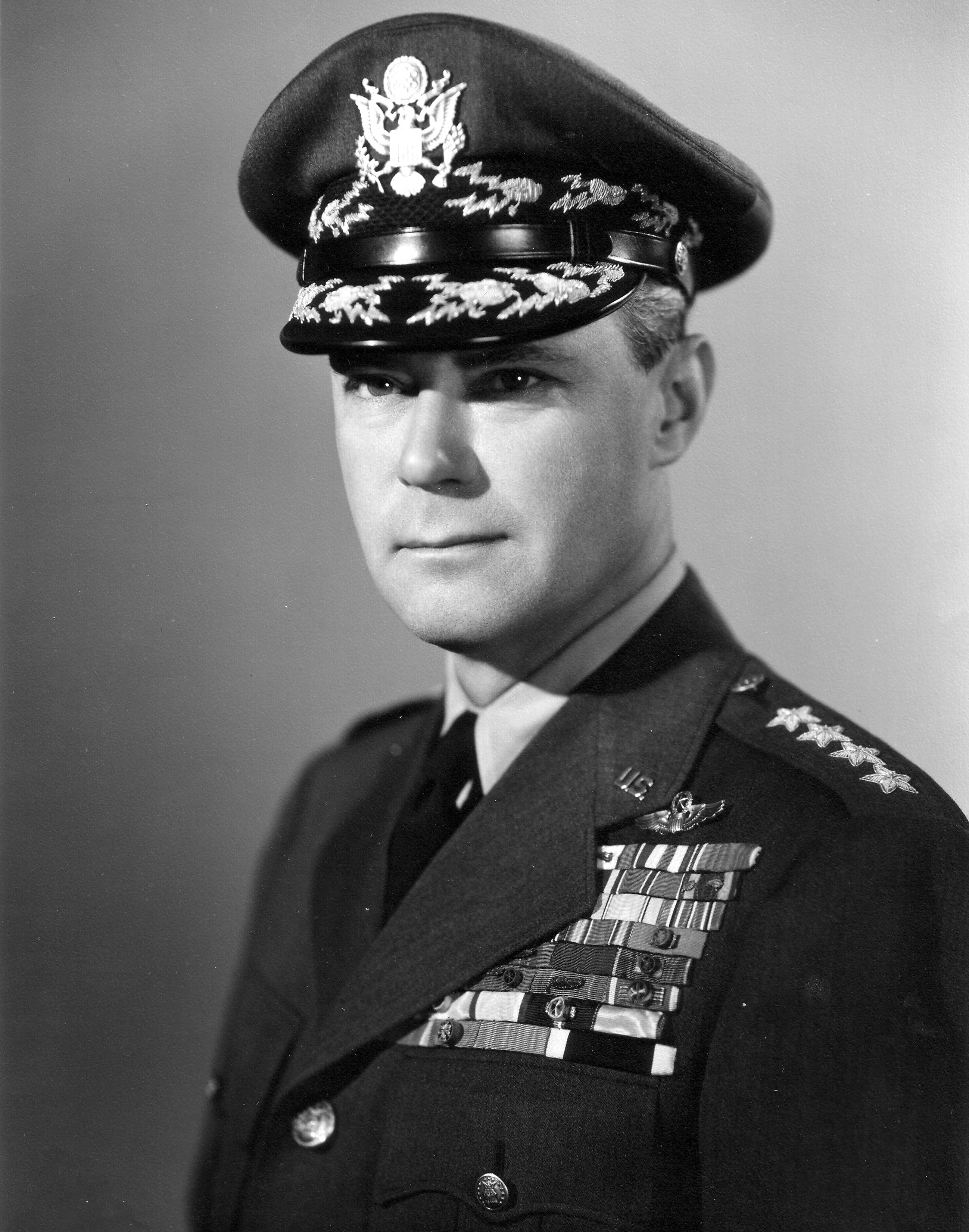 Hoyt Vandenberg, Air Force general.